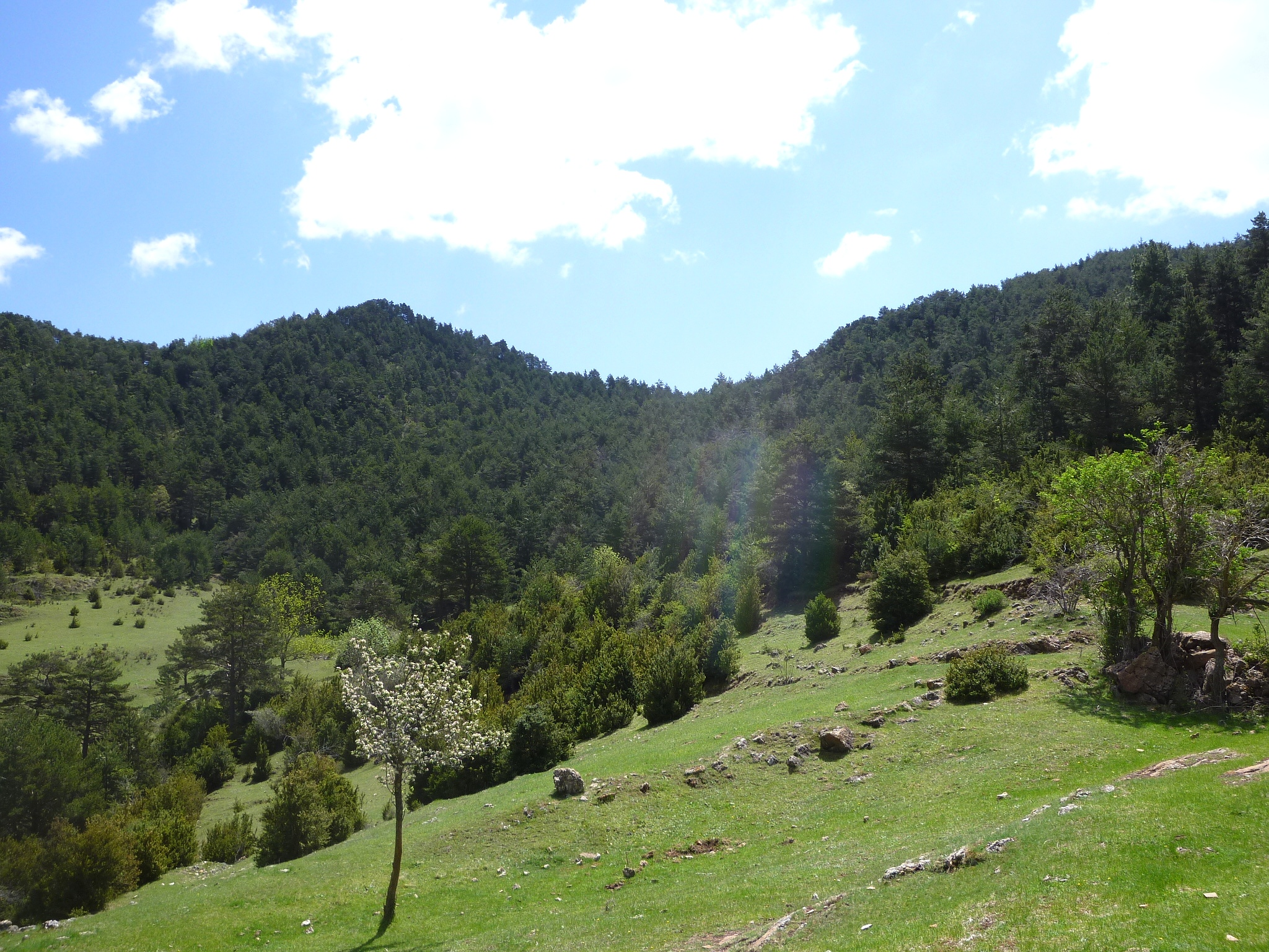 El Coll dels Brulls, al centre de la foto feta des de la Borda del Pujol, a la Serra del Verd. La Coma i la Pedra (Solsonès - Catalunya)